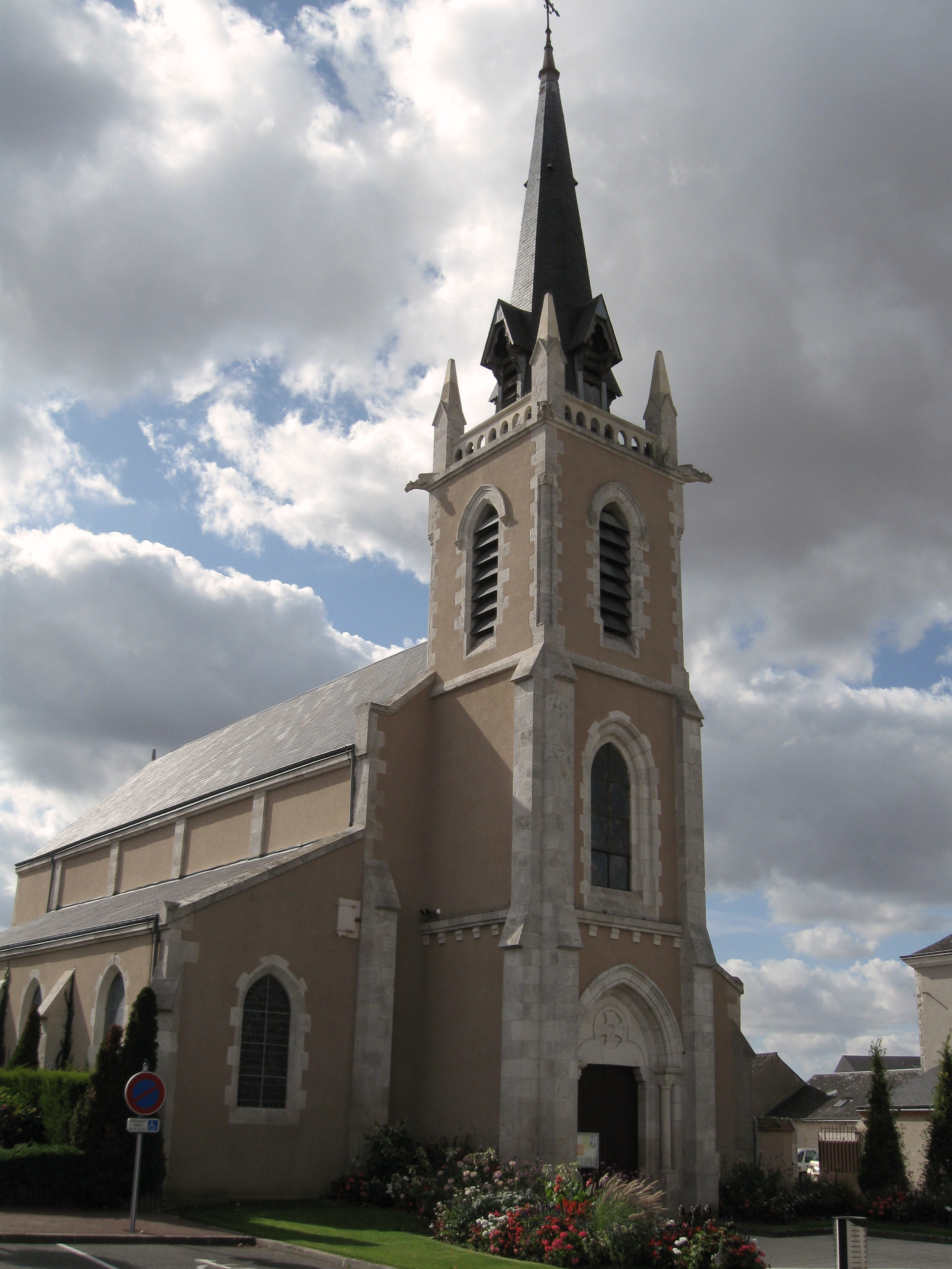 Église Notre-Dame, Ormes, Loiret, France